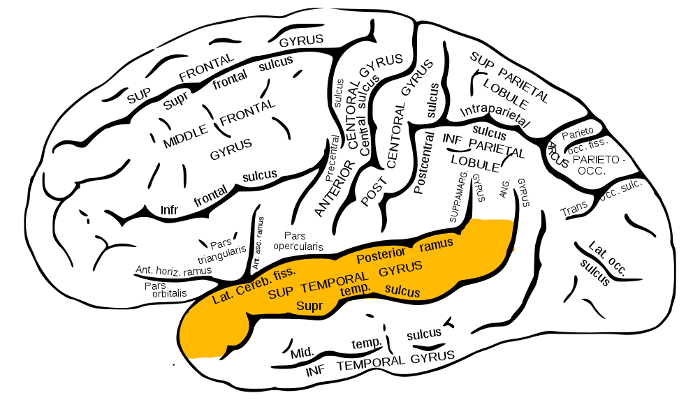 superior temporal gyrus.